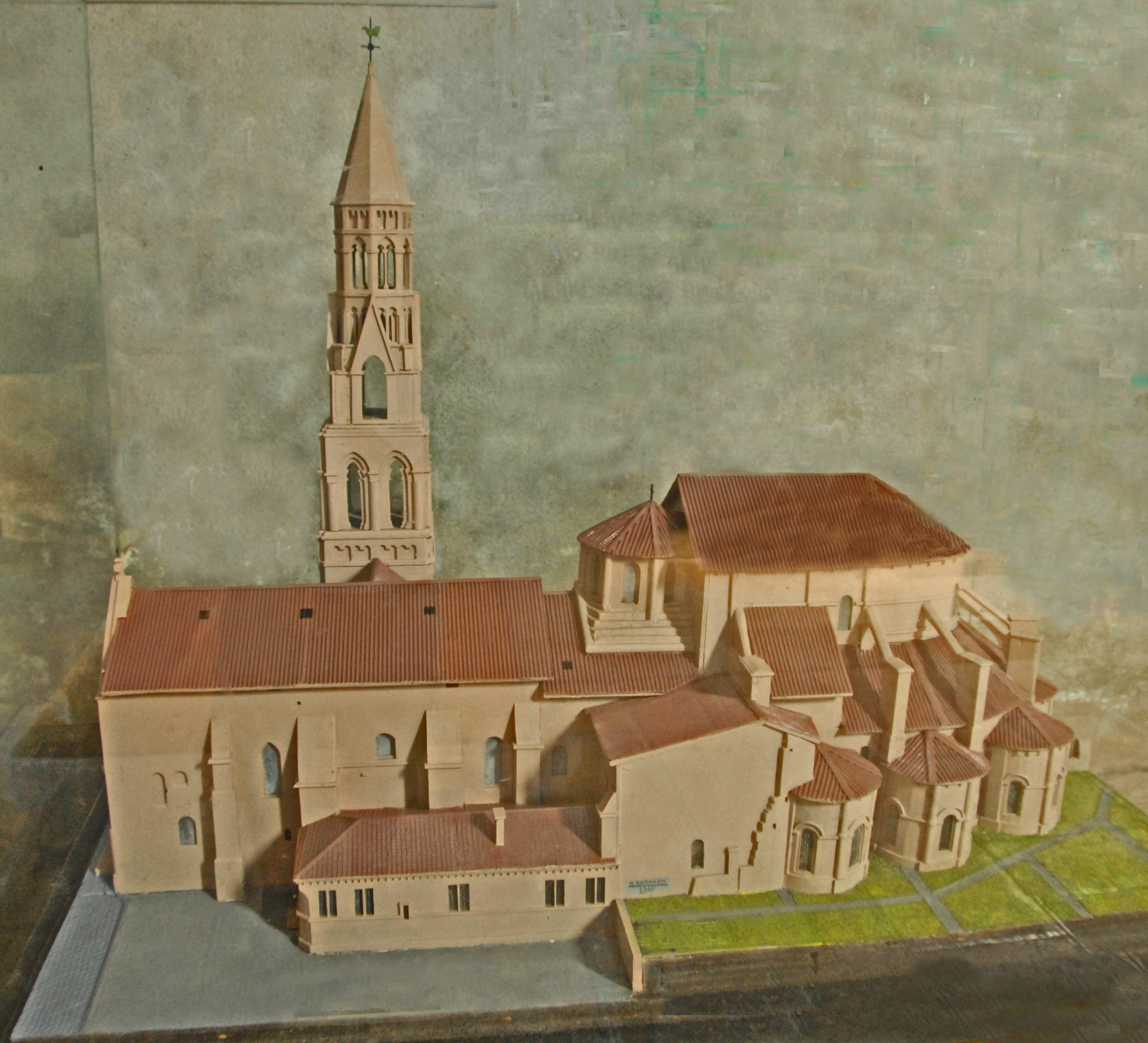 Stiftskirche St.-Léonard-de-Noblat, Modell von Süden